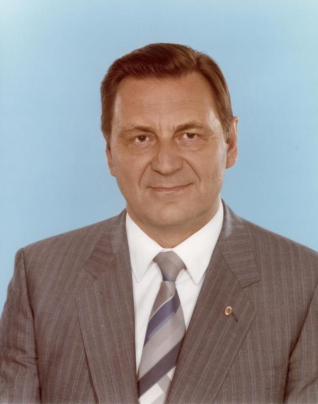 ADN-ZB/Dewag/20.5.86 Berlin: Siegfried Lorenz, Mitglied des Politbüros des ZK der SED, 1. Sekretär des SED-Bezirksleitung (bis 11.11.1989) Karl-Marx-Stadt.